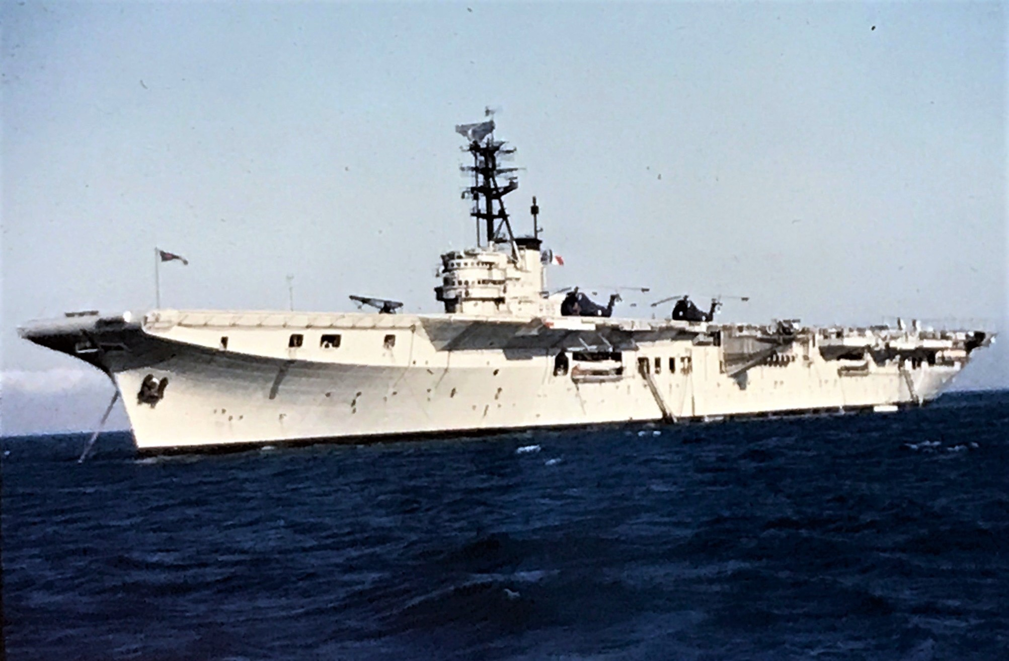 L'Arromanches en 1961 dans la mer méditerranée